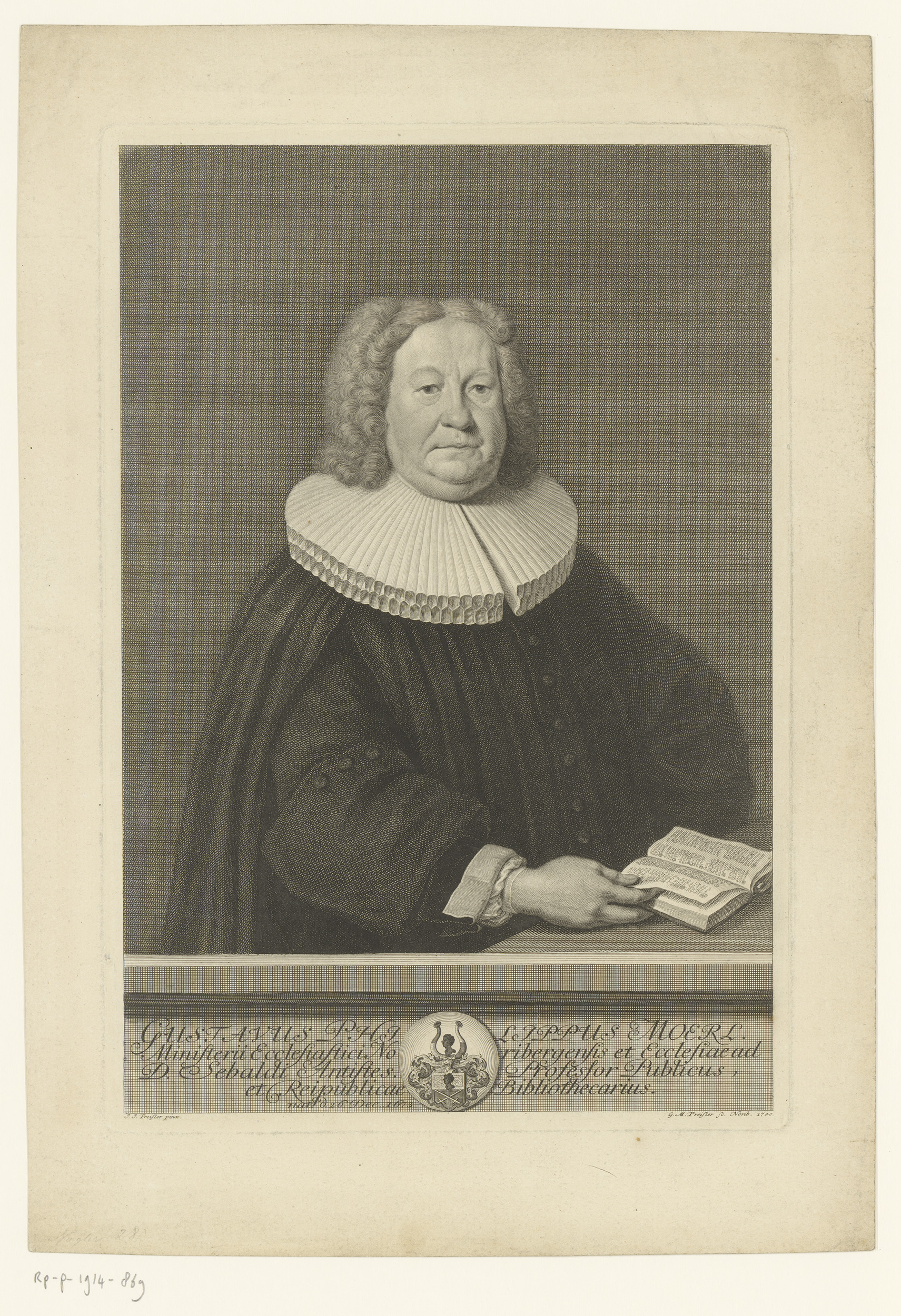 IdentificatieTitel(s): Portret van Gustav Philipp MörlObjecttype: prent Objectnummer: RP-P-1914-869Catalogusreferentie: HAB A 14217-1(2)Opschriften / Merken: verzamelaarsmerk, verso, gestempeld: Lugt 2228VervaardigingVervaardiger: prentmaker: Georg Martin Preissler (vermeld op object)naar schilderij van: Johann Justin Preissler (vermeld op object)Plaats vervaardiging: NeurenbergDatering: 1740Fysieke kenmerken: gravureMateriaal: papier Techniek: graveren (drukprocedé)Afmetingen: plaatrand: h 356 mm × b 245 mmOnderwerpWat: historical personsbooktheologianWie: Gustav Philipp MörlVerwerving en rechtenVerwerving: aankoop 1905Copyright: Publiek domein